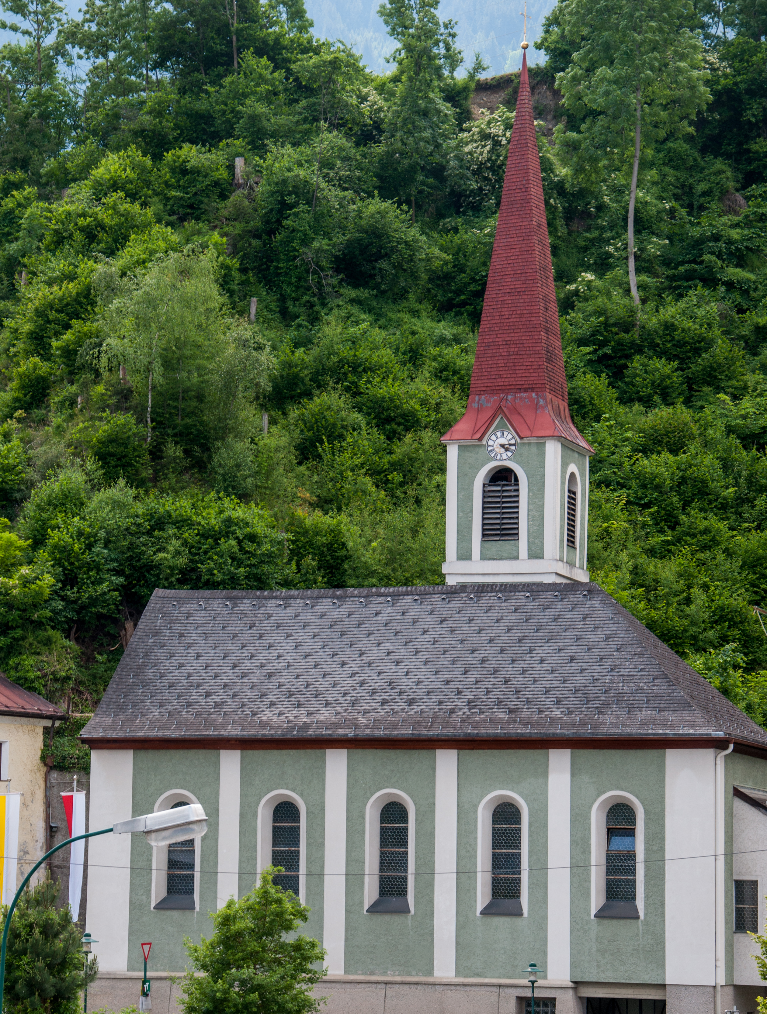 Kath. Pfarrkirche Hl. Dreifaltigkeit in Pians, Tirol. This media shows the remarkable cultural object in the Austrian state of Tyrol listed by the Tyrolean Art Cadastre with the ID 28755. (on tirisMaps, pdf, more images on Commons)